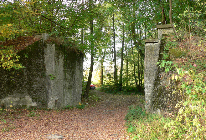 Brücke im Gilsertal an der Bahnstrecke Zimmersrode–Gemünden